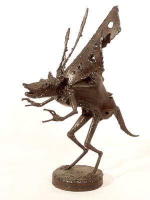 id. Szlávics László: Szörnyecske, hegesztett vas, M 36 cm, 1990 Laszlo Szlavics Sr.: Little monster, welded iron, 36 cm, 1990